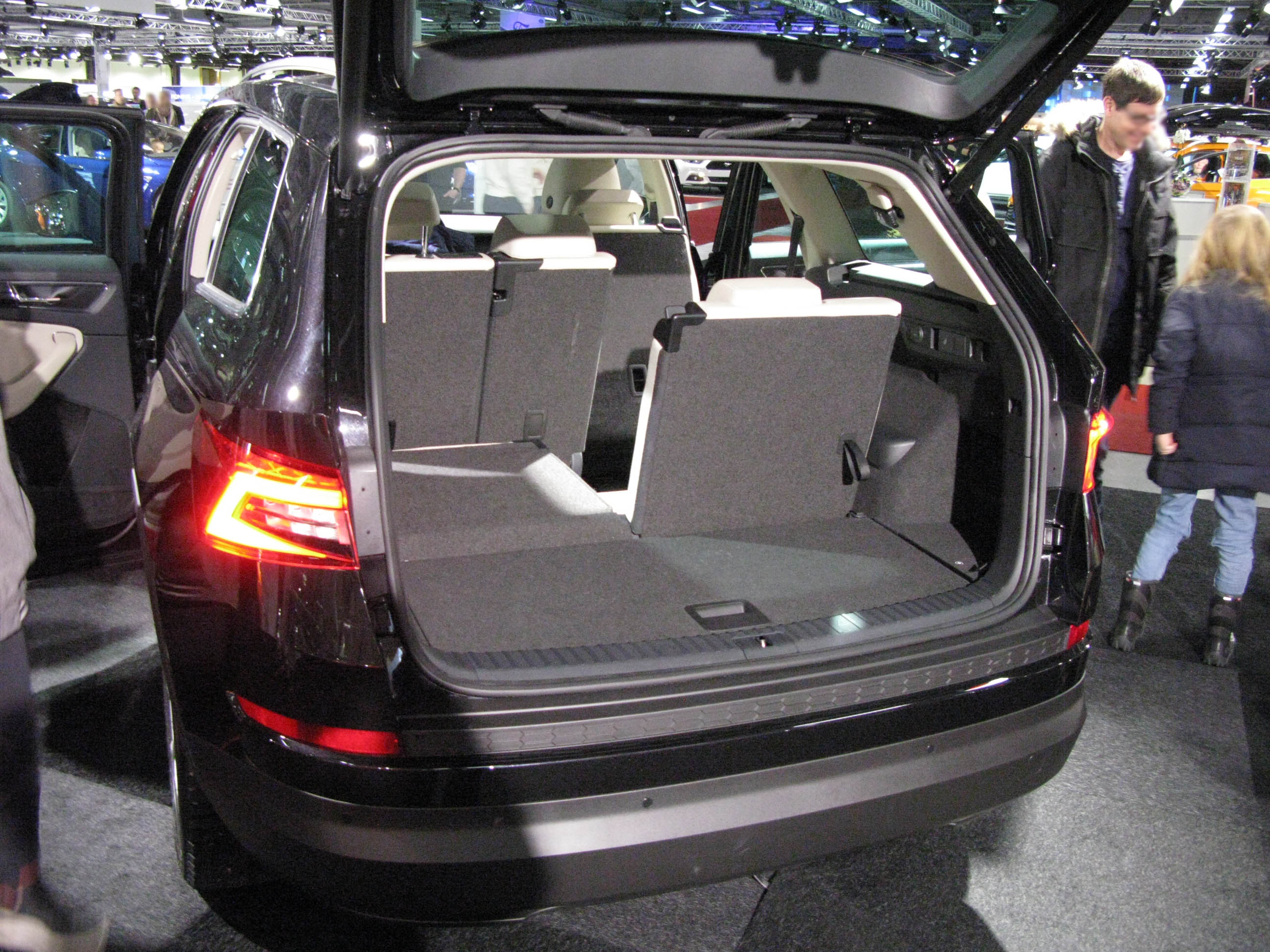 2017 Skoda Kodiaq